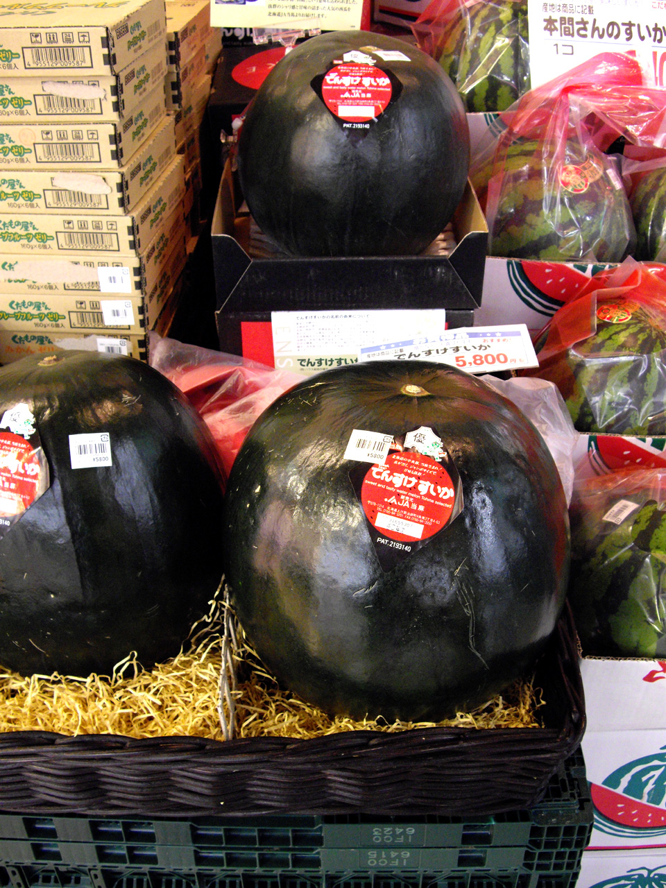 8月10日。夏休みで実家へ。といっても東京郊外だけど。実家近所のスーパーで強力インパクト、でんすけすいか